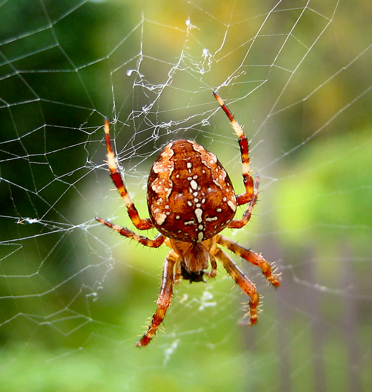 Spider, Araneus diadematus. Photo: Frode Inge Helland, 2006.09.12.